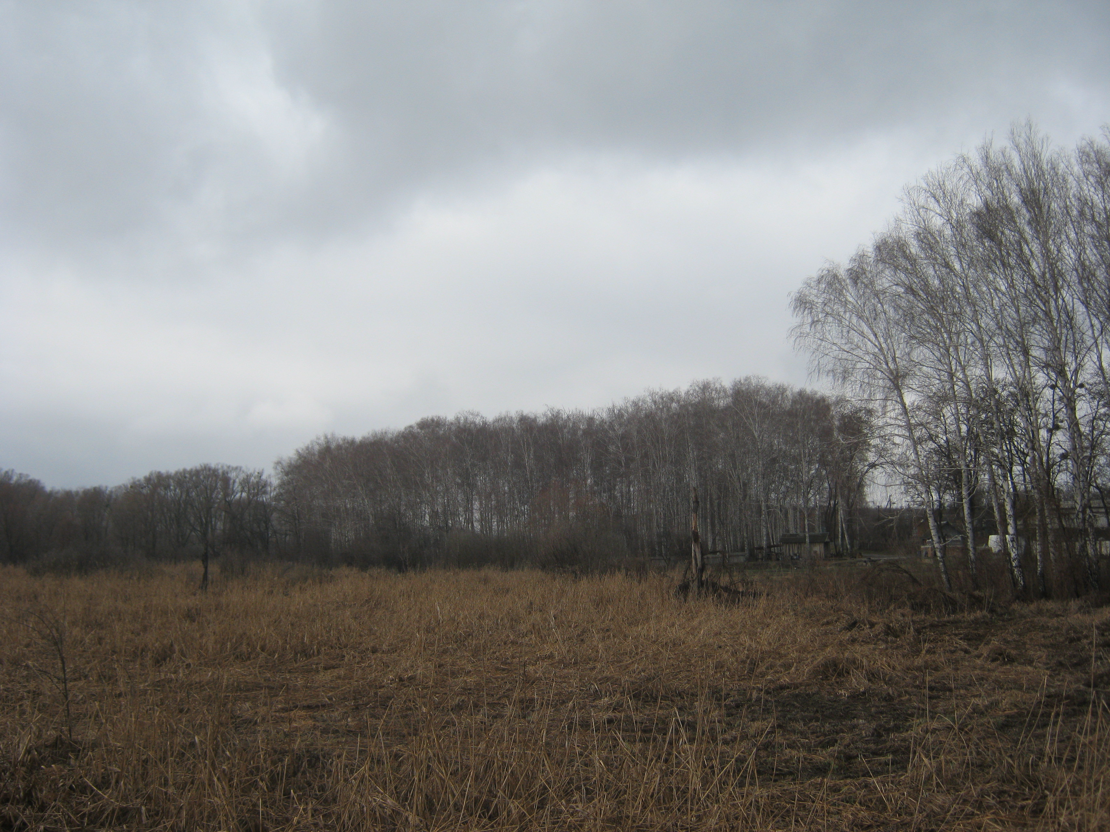 Поселення доби бронзи по пров. Прудний у м. Люботин, Люботин, у південній частині м. Люботин.